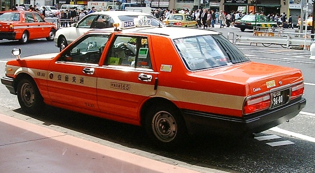 Keikyu taxi.